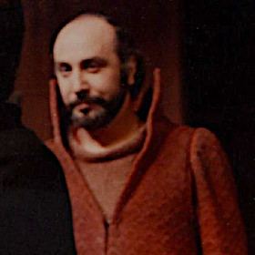 Fotografia di scena dell'Amleto di Shakespeare, andato in scena il 19 novembre 1972 al Teatro Comunale di Bolzano. Produzione Teatro Stabile di Bolzano, regia di Maurizio Scaparro, scenografie e costumi di Roberto Francia.